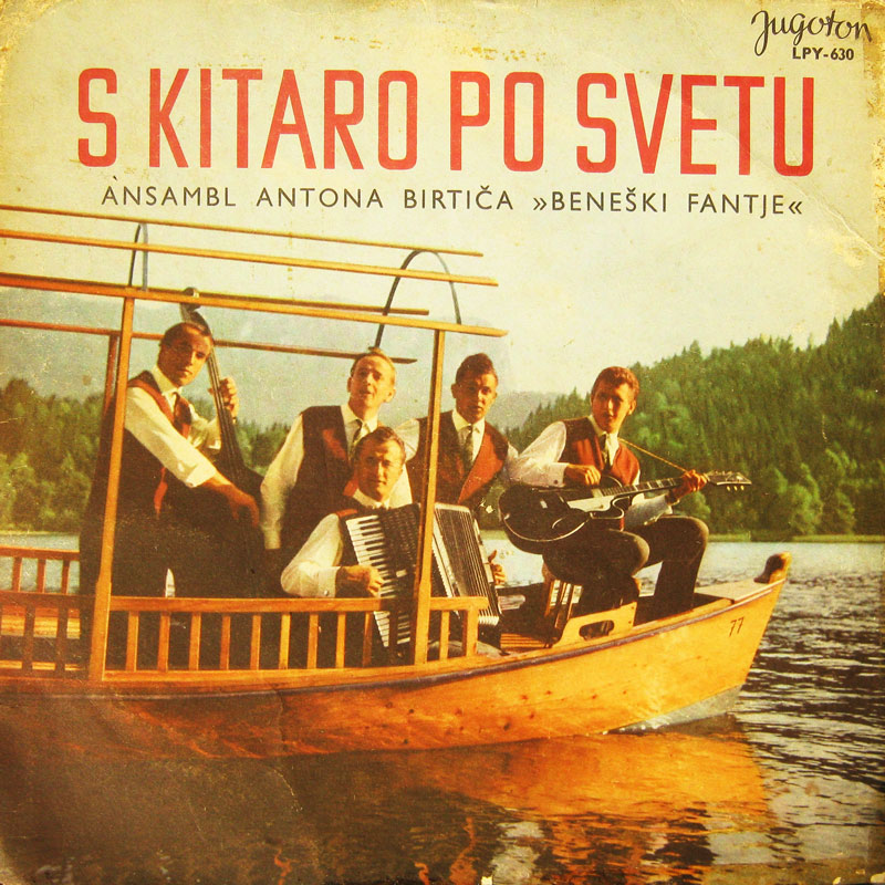 Beneški fantje - S kitaro po svetu.